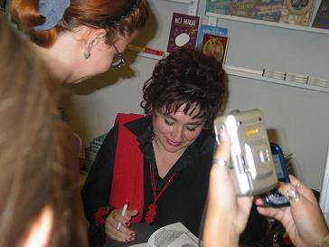 Ukrainian writer Maria Matios photo: Anna Korzeniowska-Bihun source: Anna Korzeniowska-Bihun